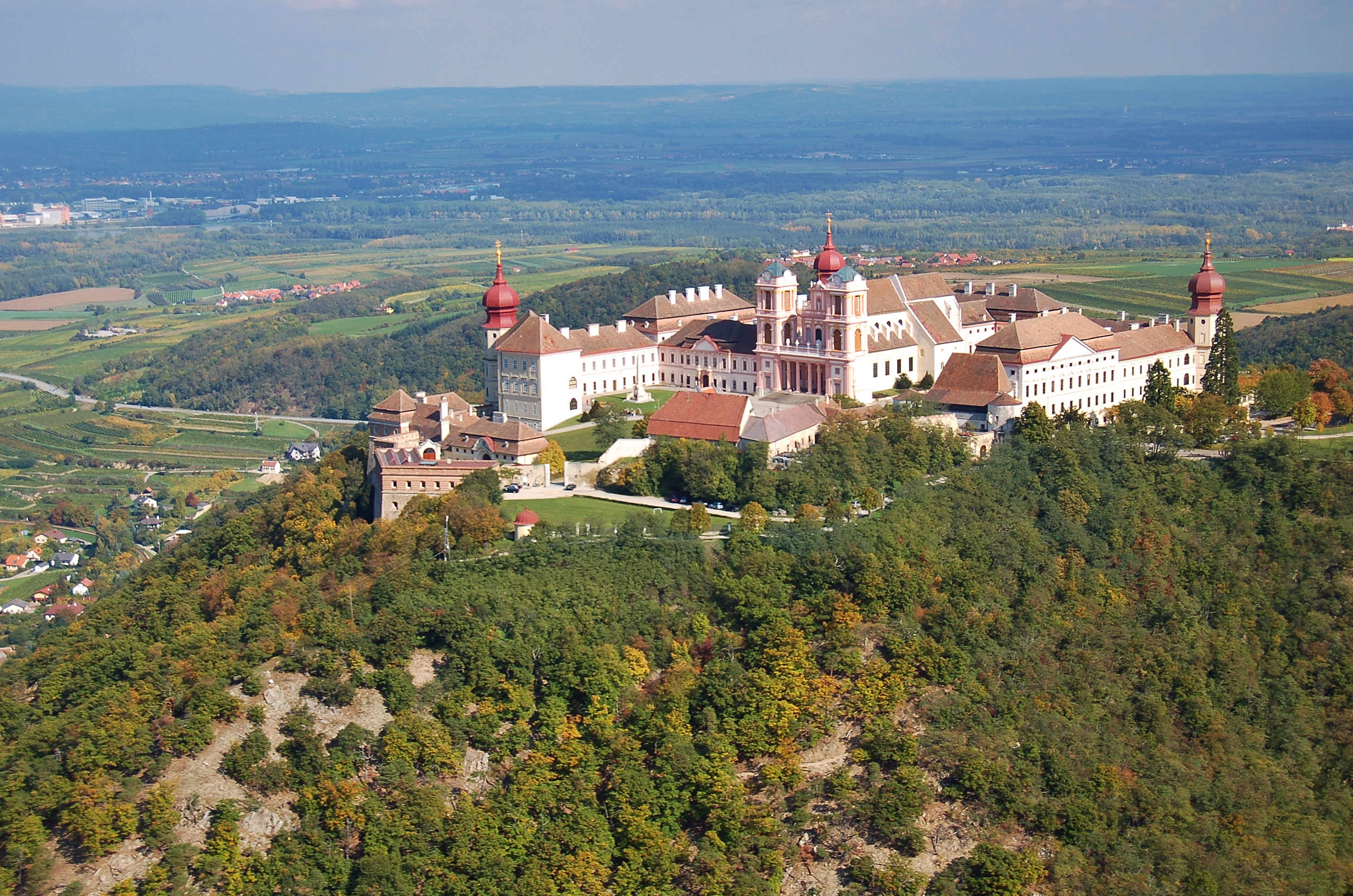 Gesamtanlage Stift Göttweig samt Vorgängerbauten, frühere Besiedlung